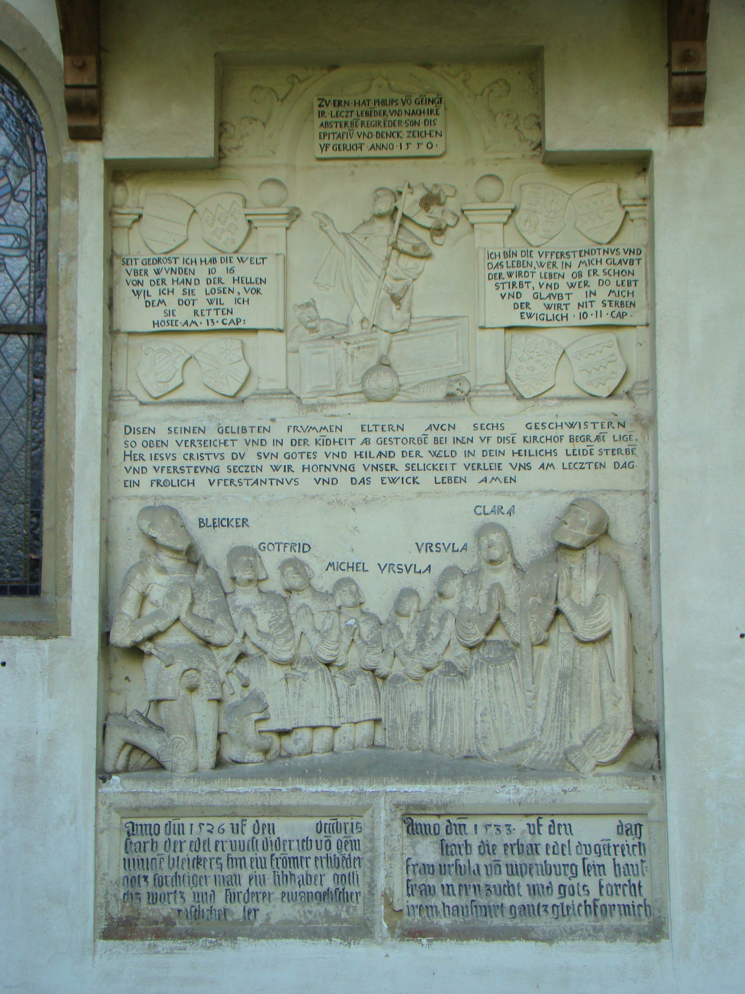 Historisches Grabmal für Dietrich von Gemmingen, seine Gemahlin Ursula von Nippenburg und ihre sechs verstorbenen Kinder. Philipp der Weise ließ es 1550 für seine Eltern und Geschwister gestalten. Burgkapelle der Burg Guttenberg in Haßmersheim-Neckarmühlbach